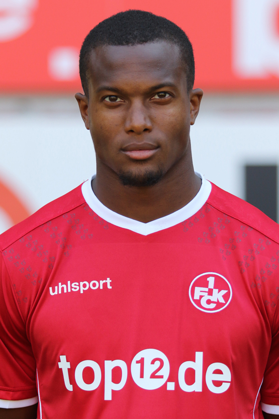 Gervane Kastaneer